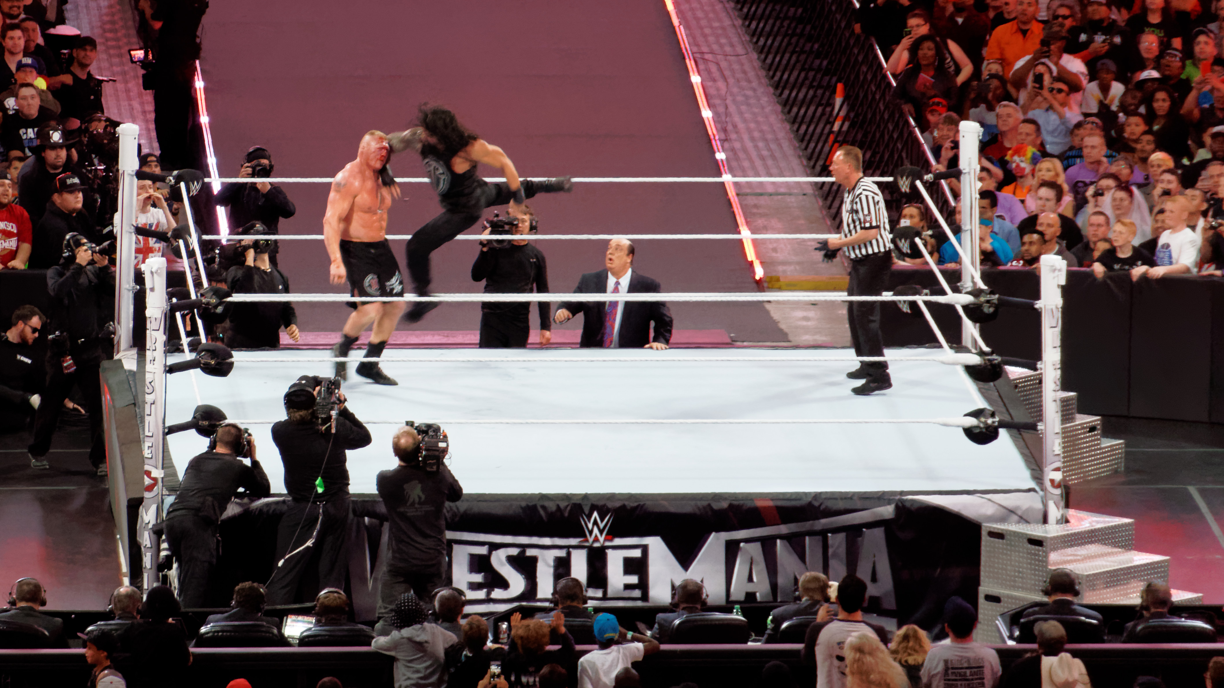 2015-03-29_19-53-39_ILCE-6000_9998_DxO